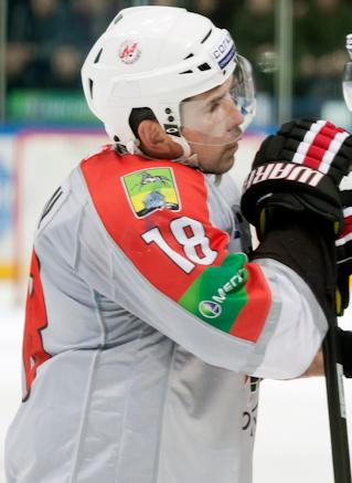 Нападающий новокузнецкого «Металлурга» Сергей Брылин во время матча чемпионата КХЛ против хабаровского «Амура» 6 февраля 2012 года.